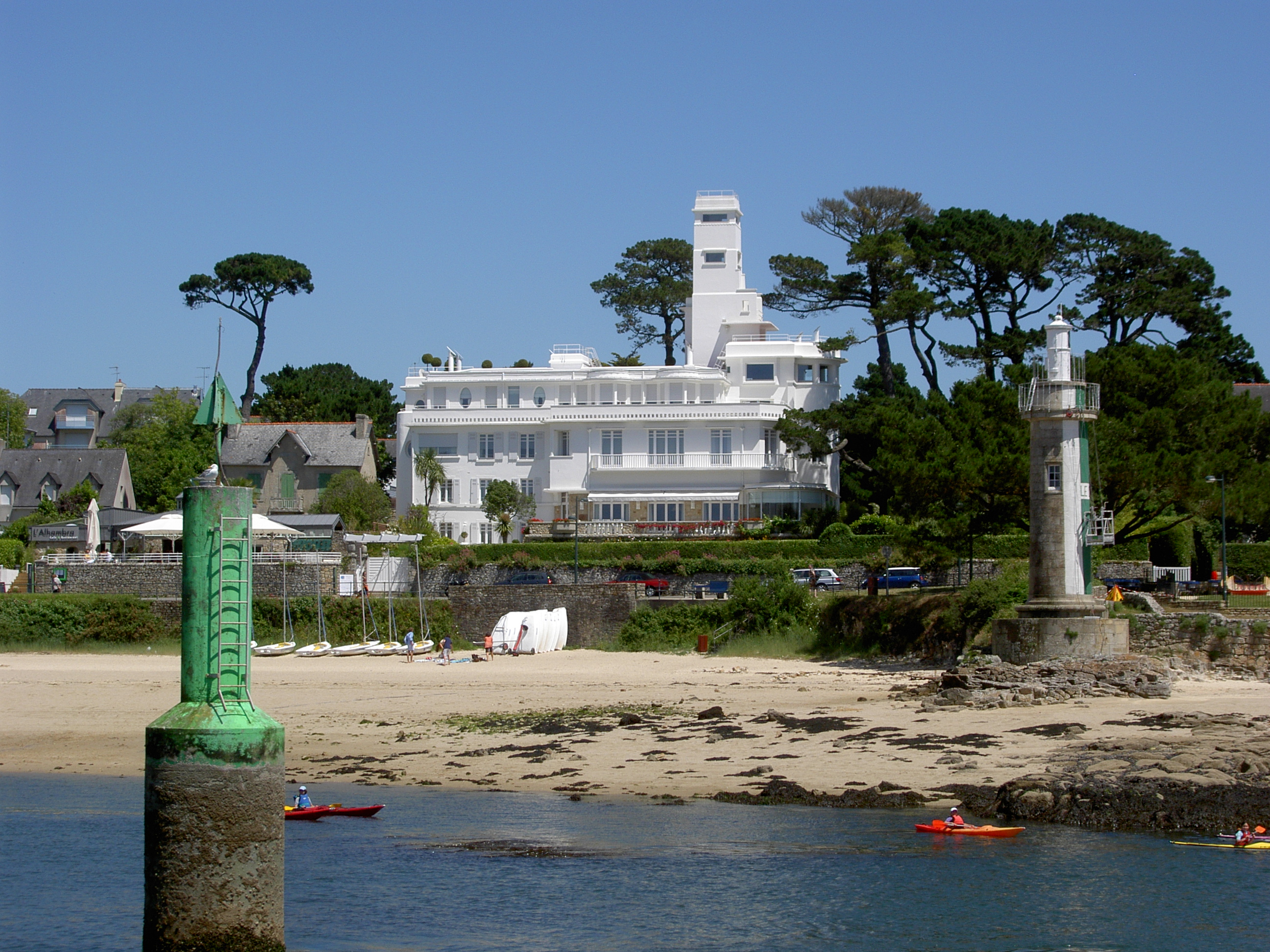 ancienne villa Magdalena actuellement Hôtel le Minare